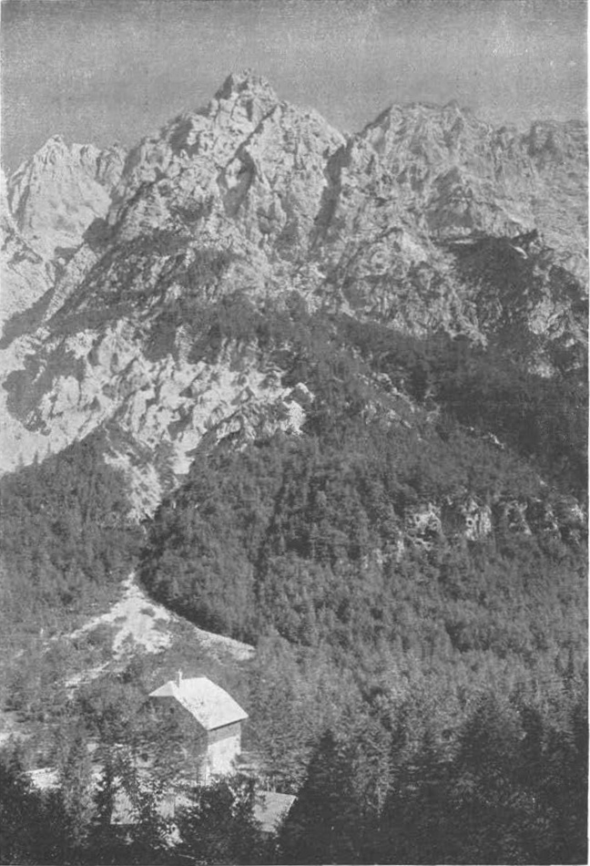 Aljažev dom - Cmir.